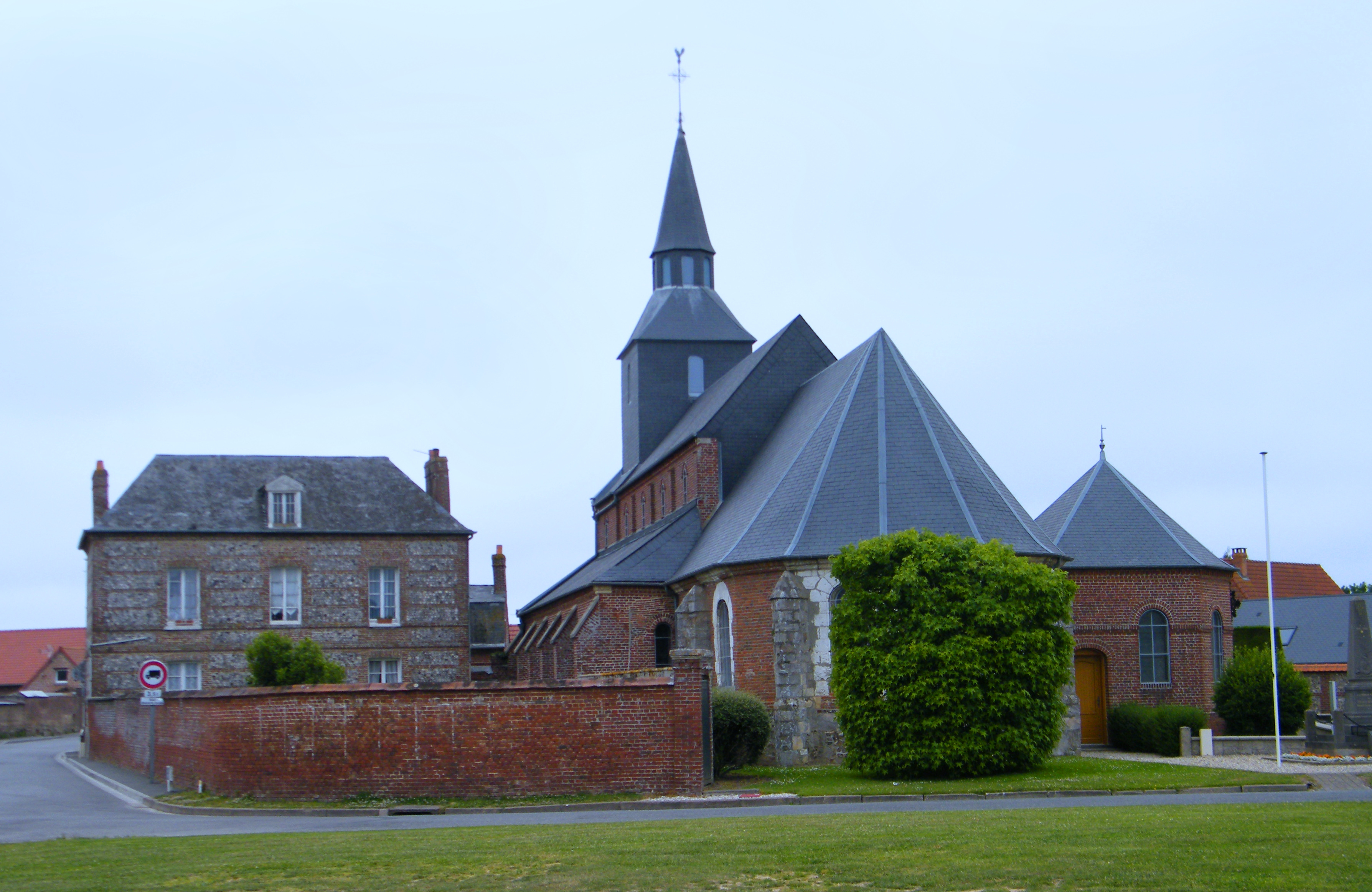 Église - Etalondes (Seine-Maritime) France